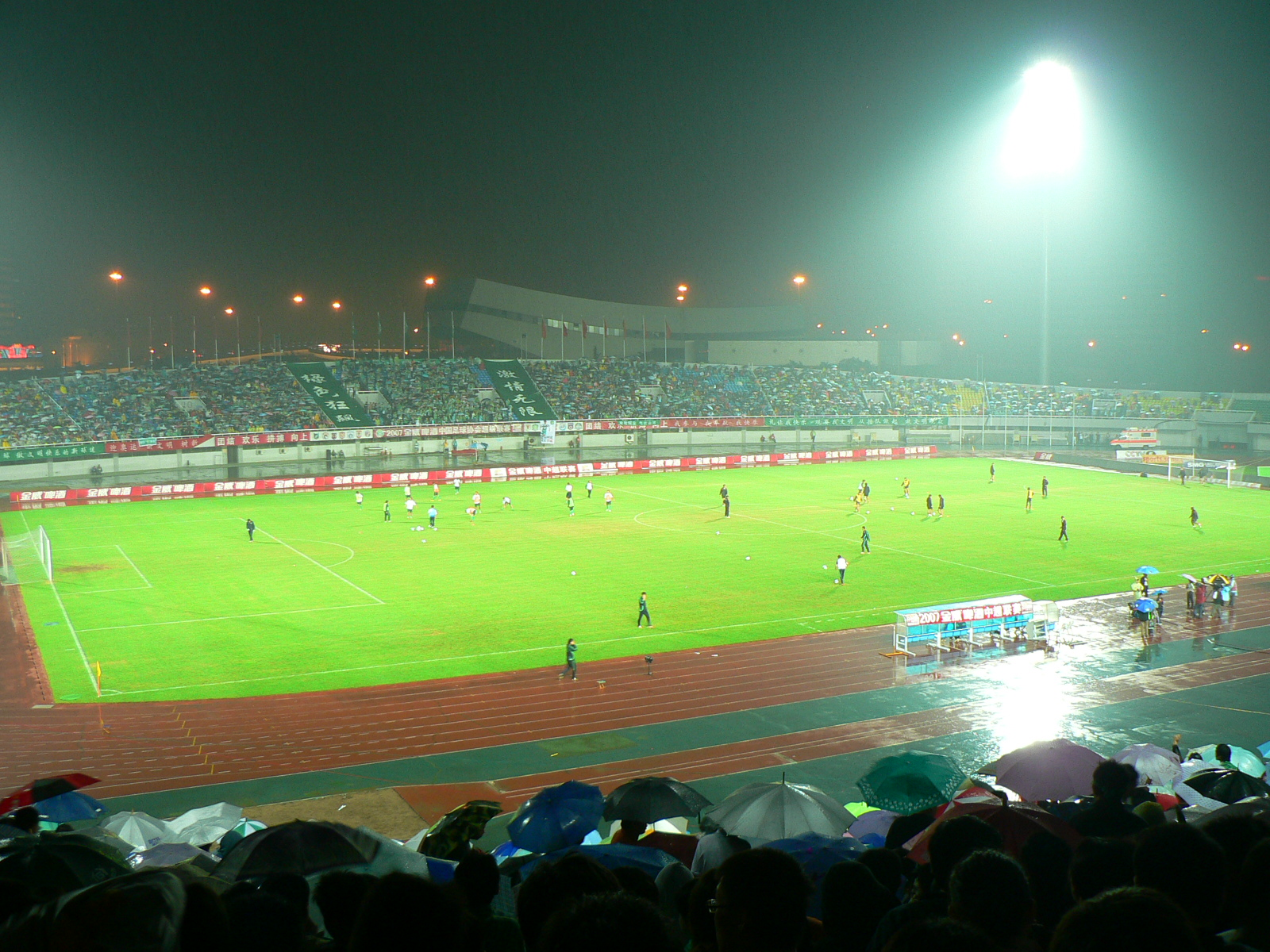 北京国安主场